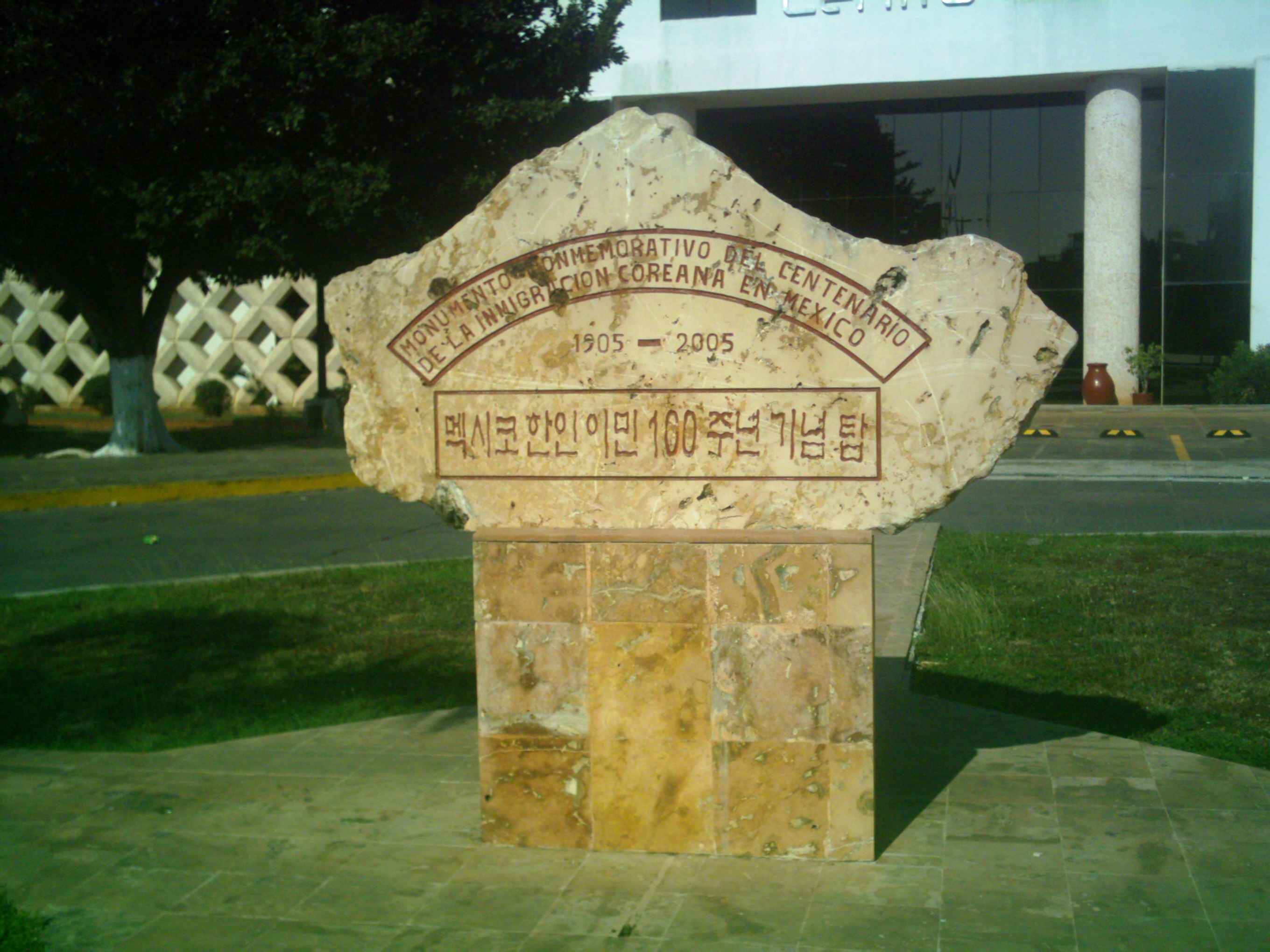 Monumento a la inmigracíon coreana en Yucatán.